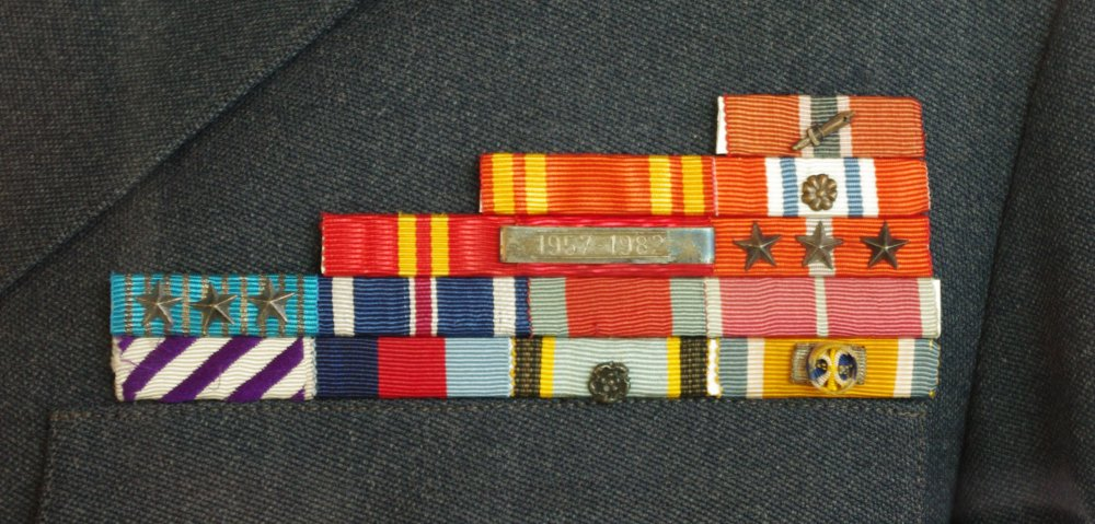 Norsk ordensbånd